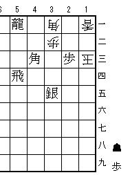 桂九雀が創作した詰将棋作品